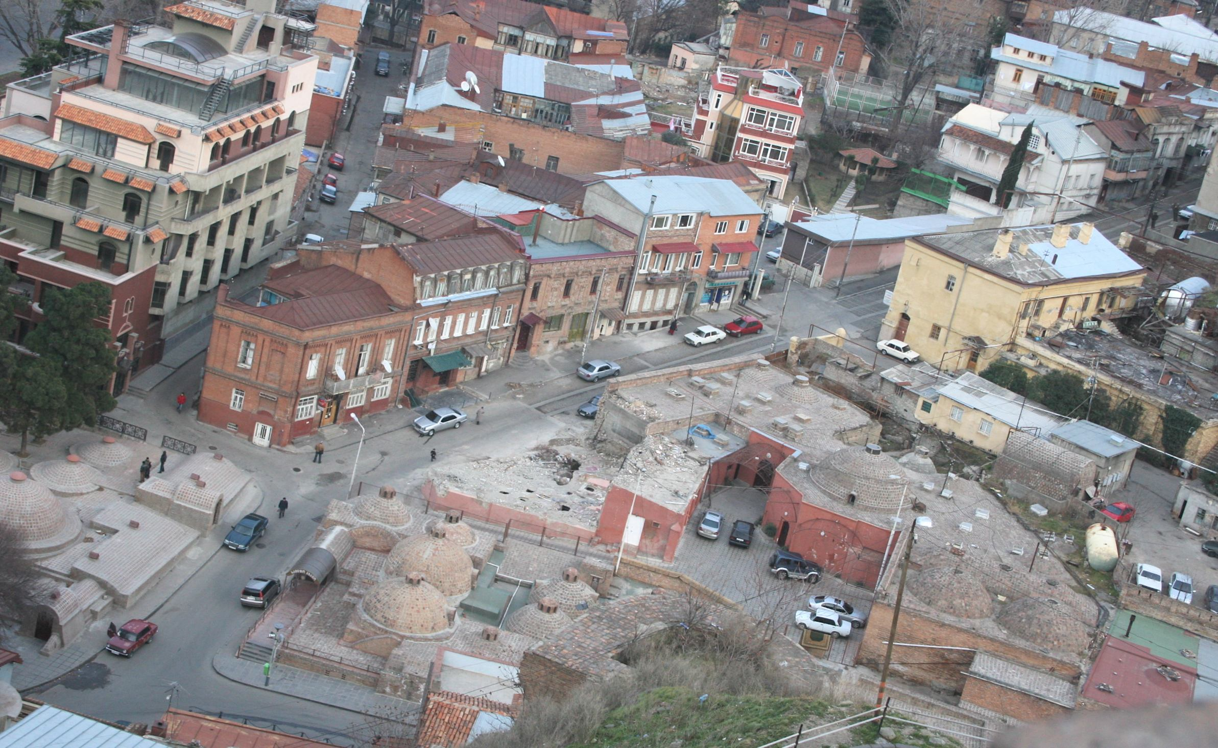 აბანოთუბანი, ხედი ნარიყალადან.